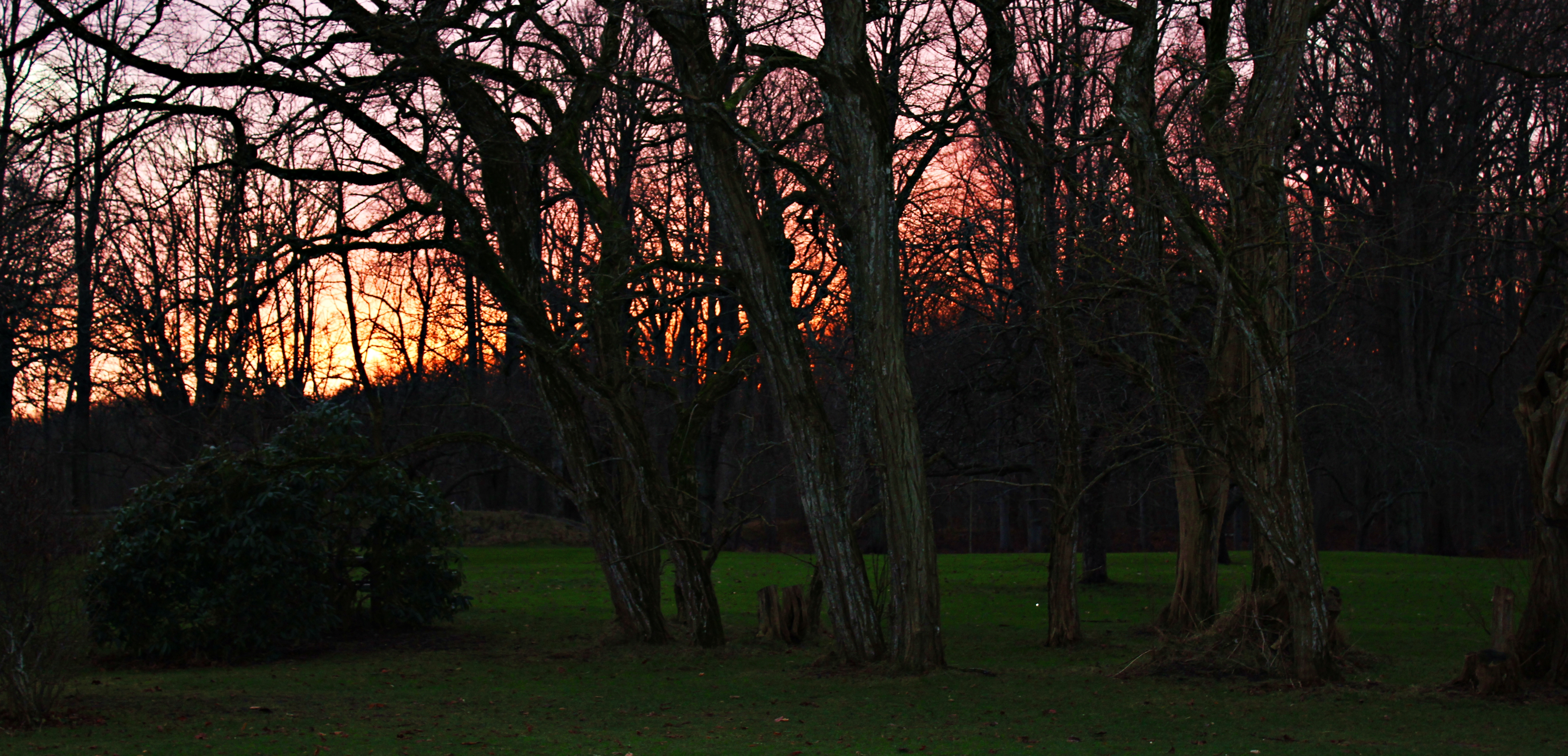 Hagen ved Galleri F15, Jeløy